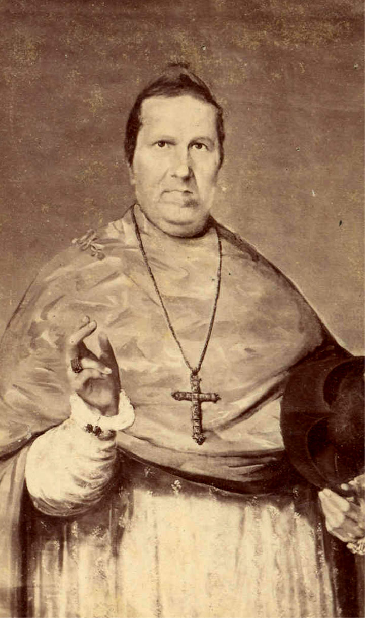 Juan de la Cruz Gómez Plata (* Barichara, Santander, 5 de mayo de 1793 - † Medellín, Antioquia, 1 de diciembre de 1850), fue un obispo colombiano de la Iglesia Católica Romana.